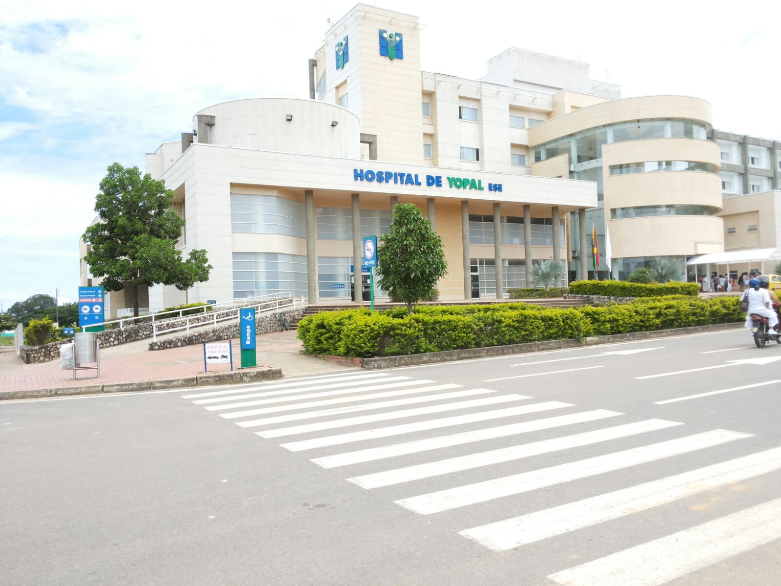 hospital de yopal sede nueva